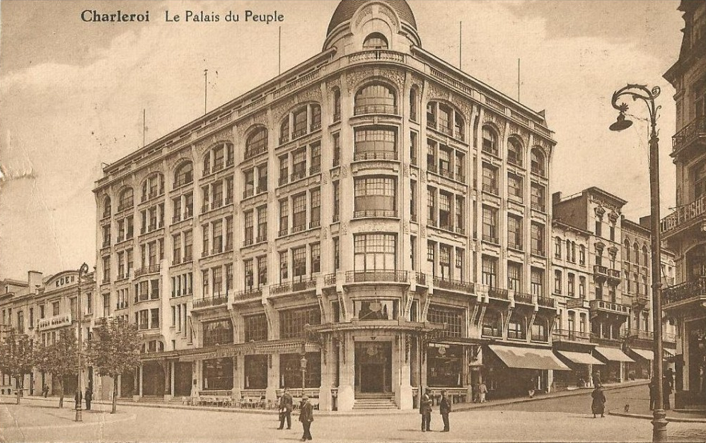 Charleroi (Belgique) - Palais du Peuple. Construction 1925 - démolition 1980